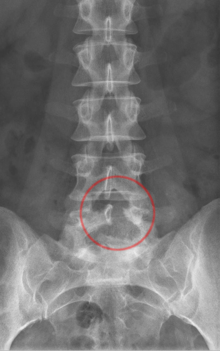 Röntgenbild der LWS nach Hemilaminektomie LWK 5 links. Der Dornfortsatz ist erhalten.